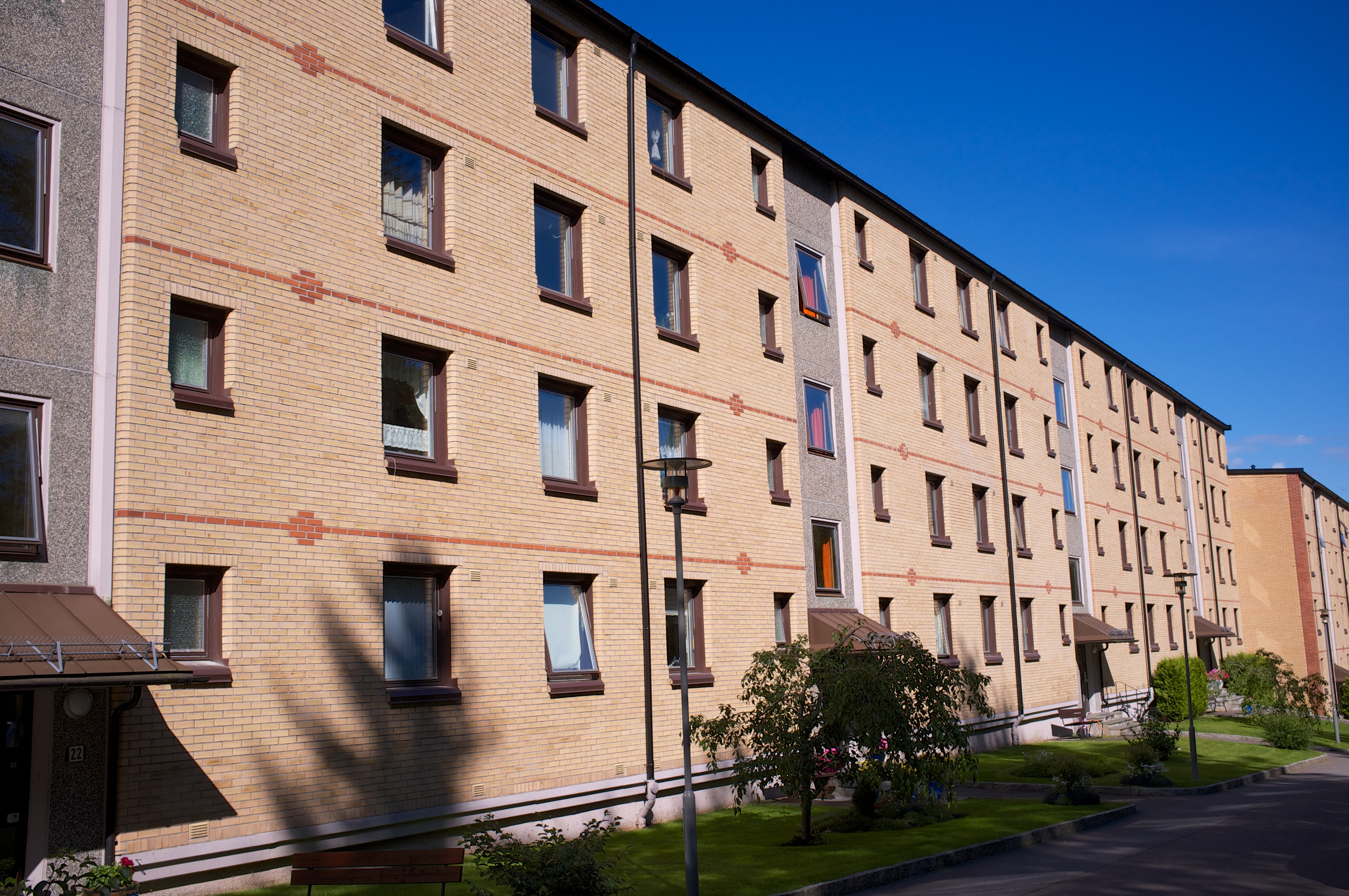 Olav Nygards veg på Ulsrud i Oslo.